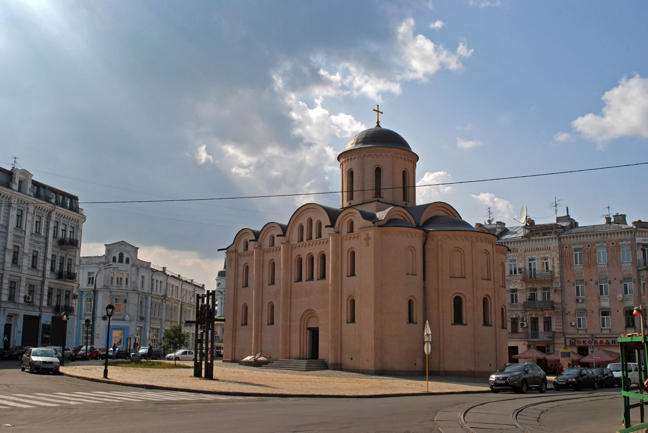 Фундаменти та залишки стін церкви Богородиці Пирогощі, Київ, Контрактова пл.